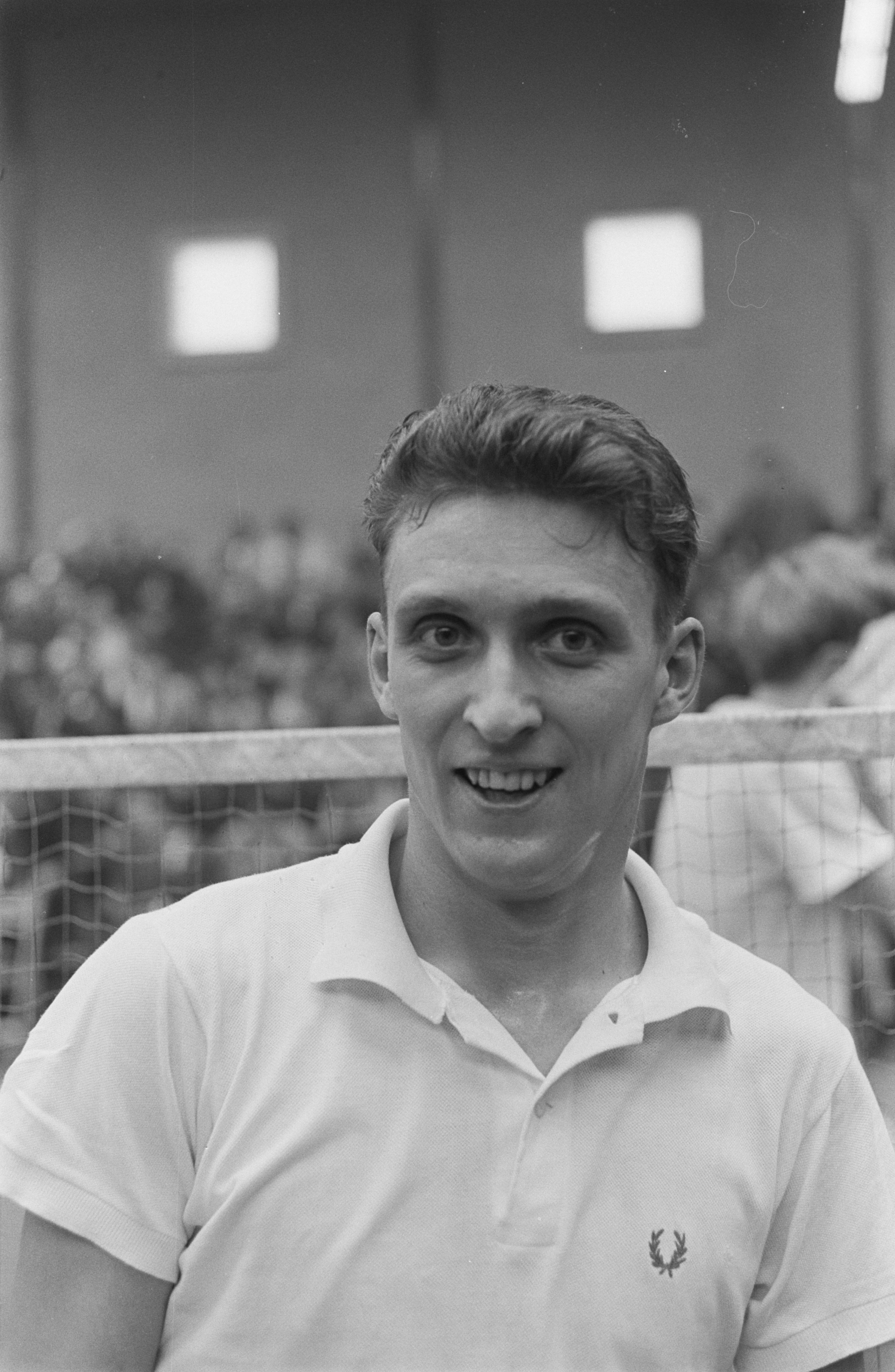 Collectie / Archief : Fotocollectie Anefo Reportage / Serie : [ onbekend ] Beschrijving : Internationale Badmintonkampioenschappen te Haarlem. Nr. 17, 18, 19 Henning Borch (kop) Datum : 10 februari 1963 Locatie : Haarlem Trefwoorden : Badminton, KOPPEN, kampioenschappen Persoonsnaam : Henning Borch Fotograaf : Pot, Harry / Anefo Auteursrechthebbende : Nationaal Archief Materiaalsoort : Negatief (zwart/wit) Nummer archiefinventaris : bekijk toegang 2.24.01.05 Bestanddeelnummer : 914-8059